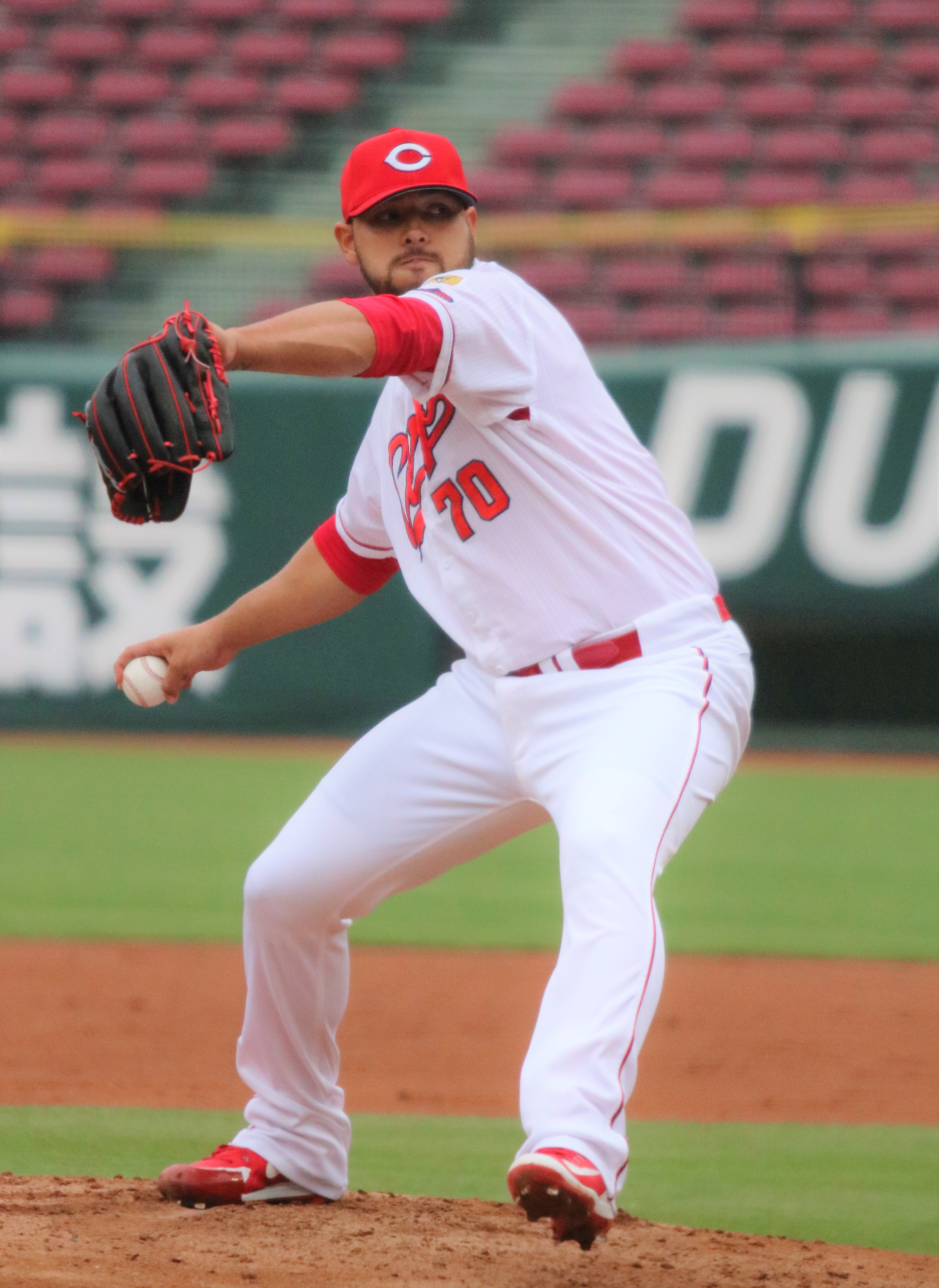 2018年4月14日ウエスタンリーグ